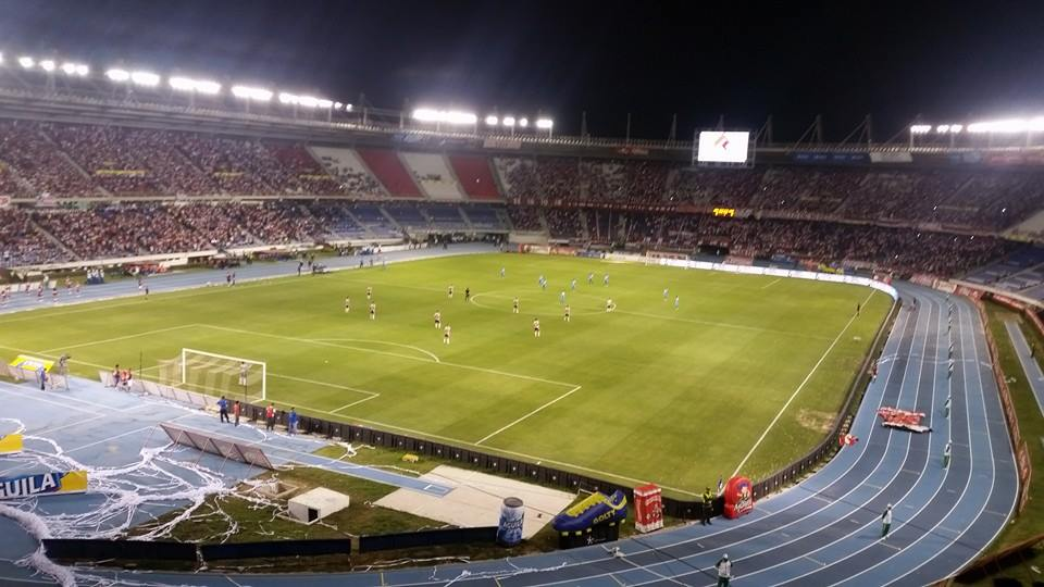 Estadio Metropolitano Roberto Melendez